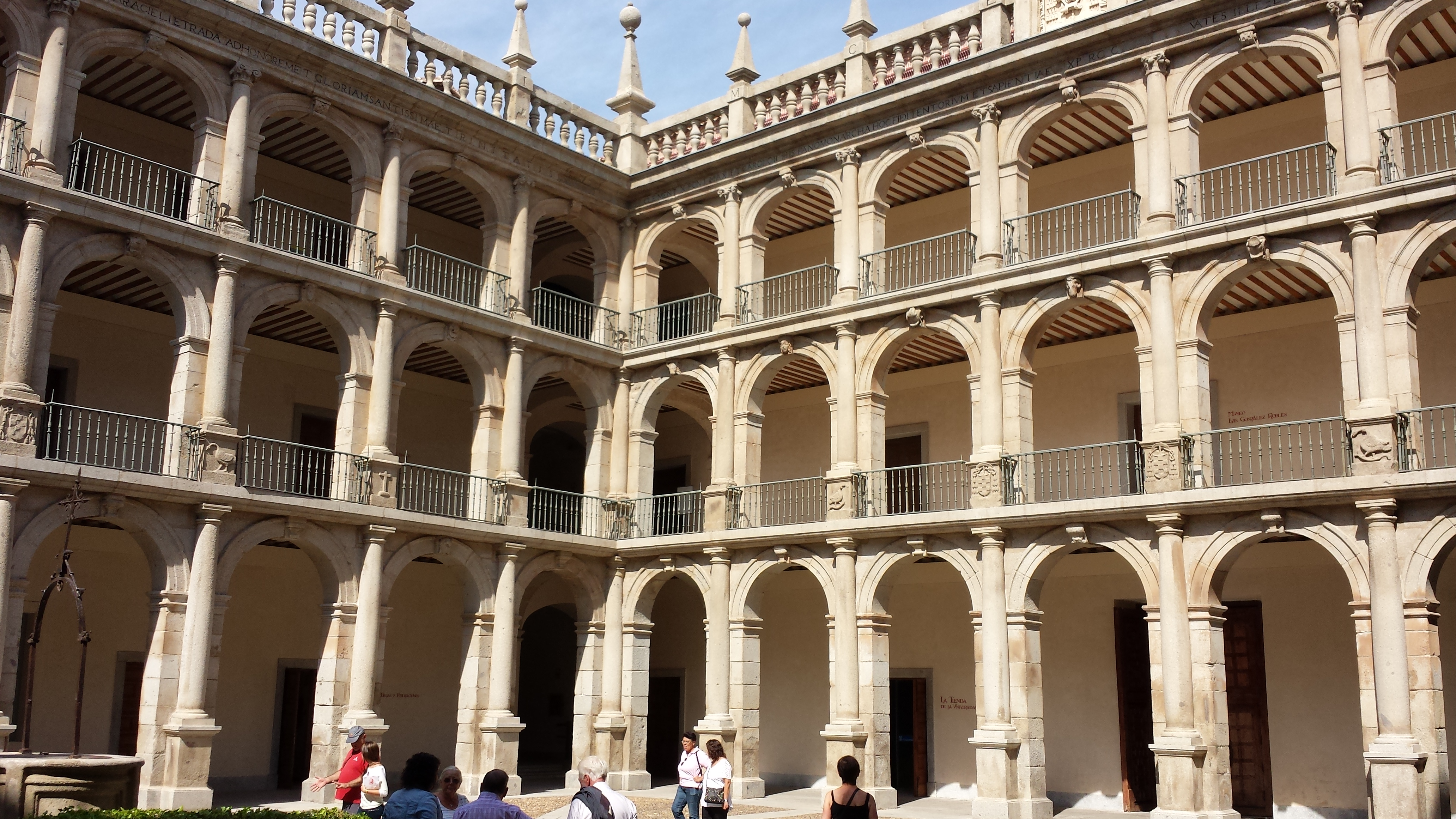 Erster Innenhof der historischen Universität Alcalá